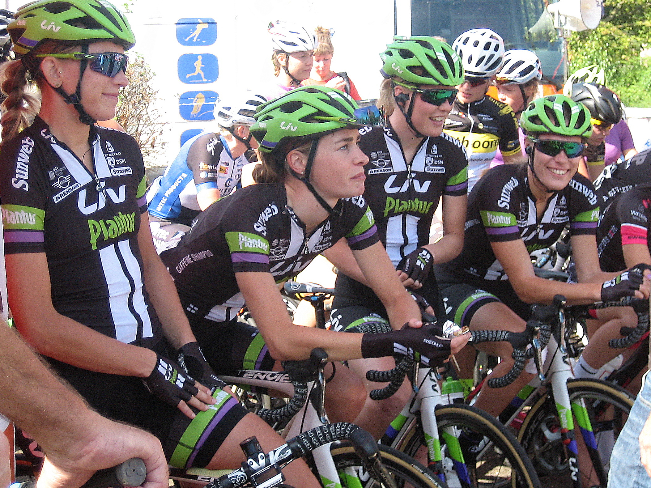 Team Liv-Plantur voor start 3e etappe Holland Ladies Tour 2016